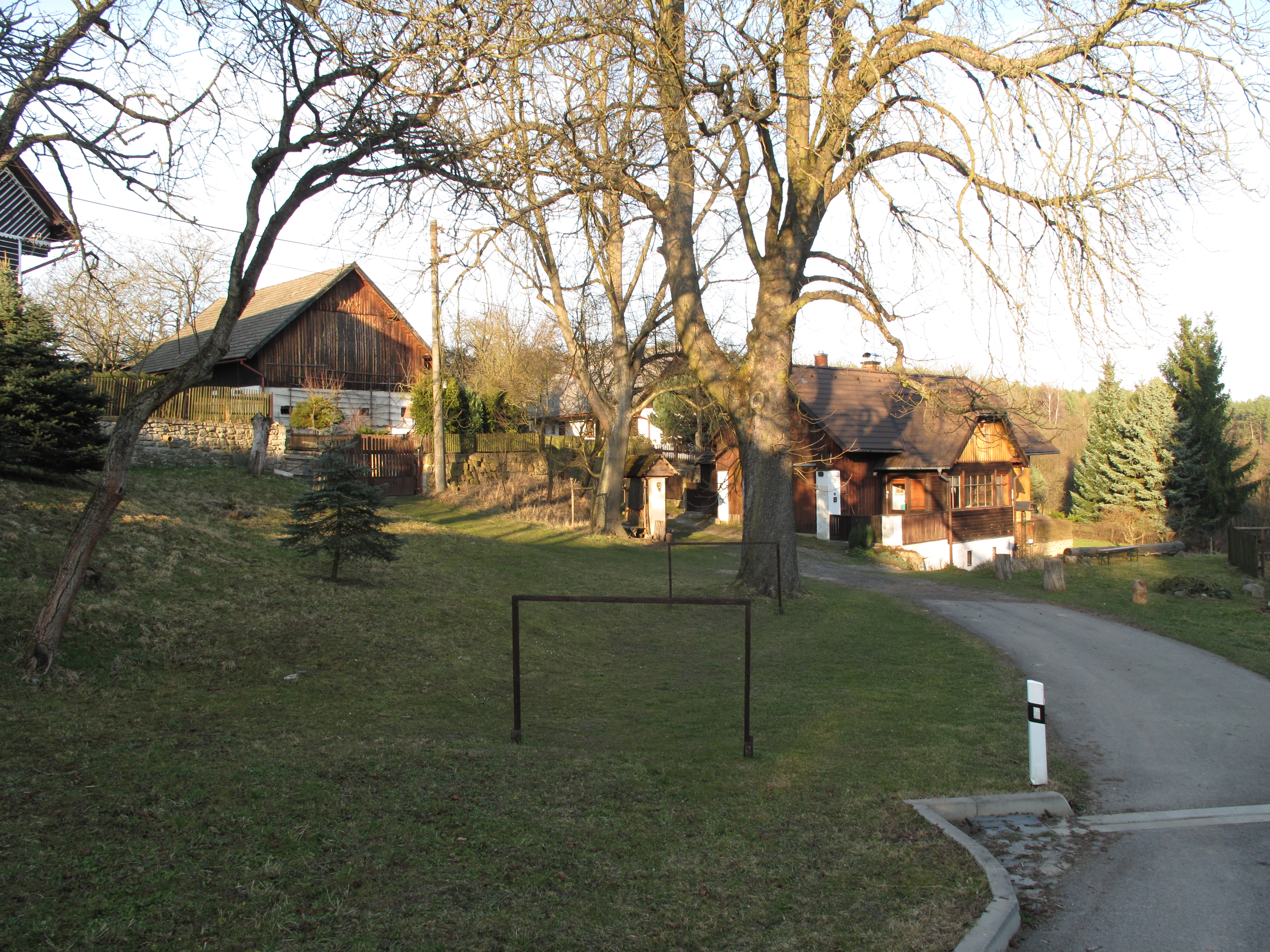 Náves v Benešovicích. Okres Liberec, Česká republika.